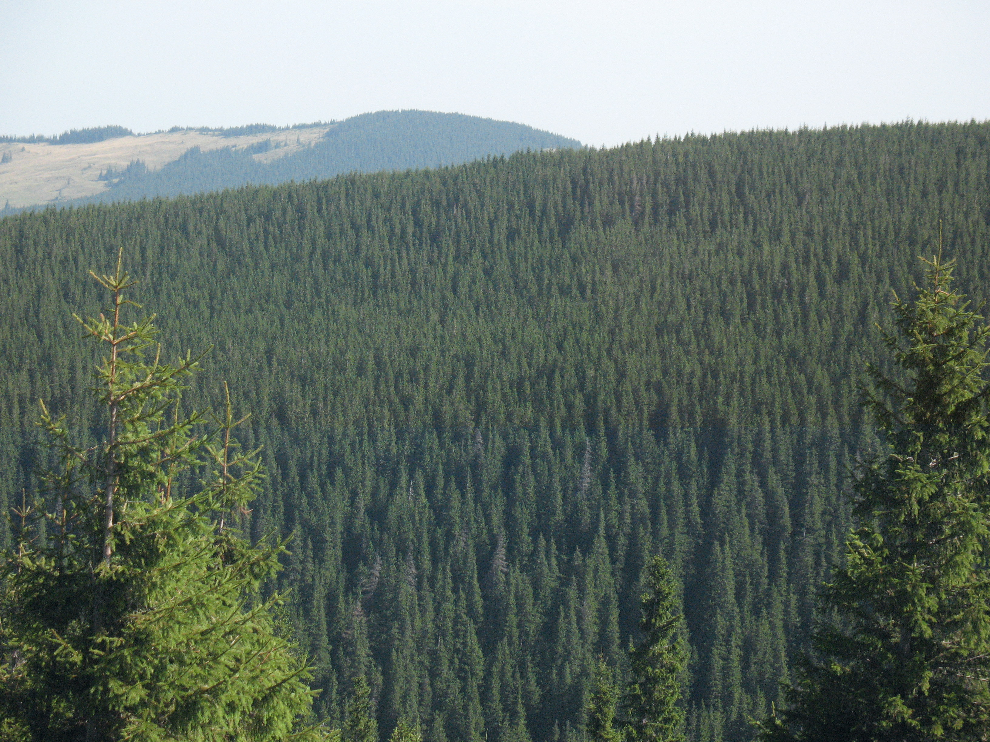 Ліси на підйомі до вершини Говерли